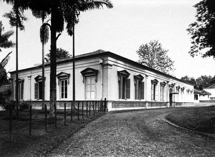 Repronegatief. Het Zoölogisch Museum en laboratorium van 's Lands Plantentuin te Buitenzorg, West-Java